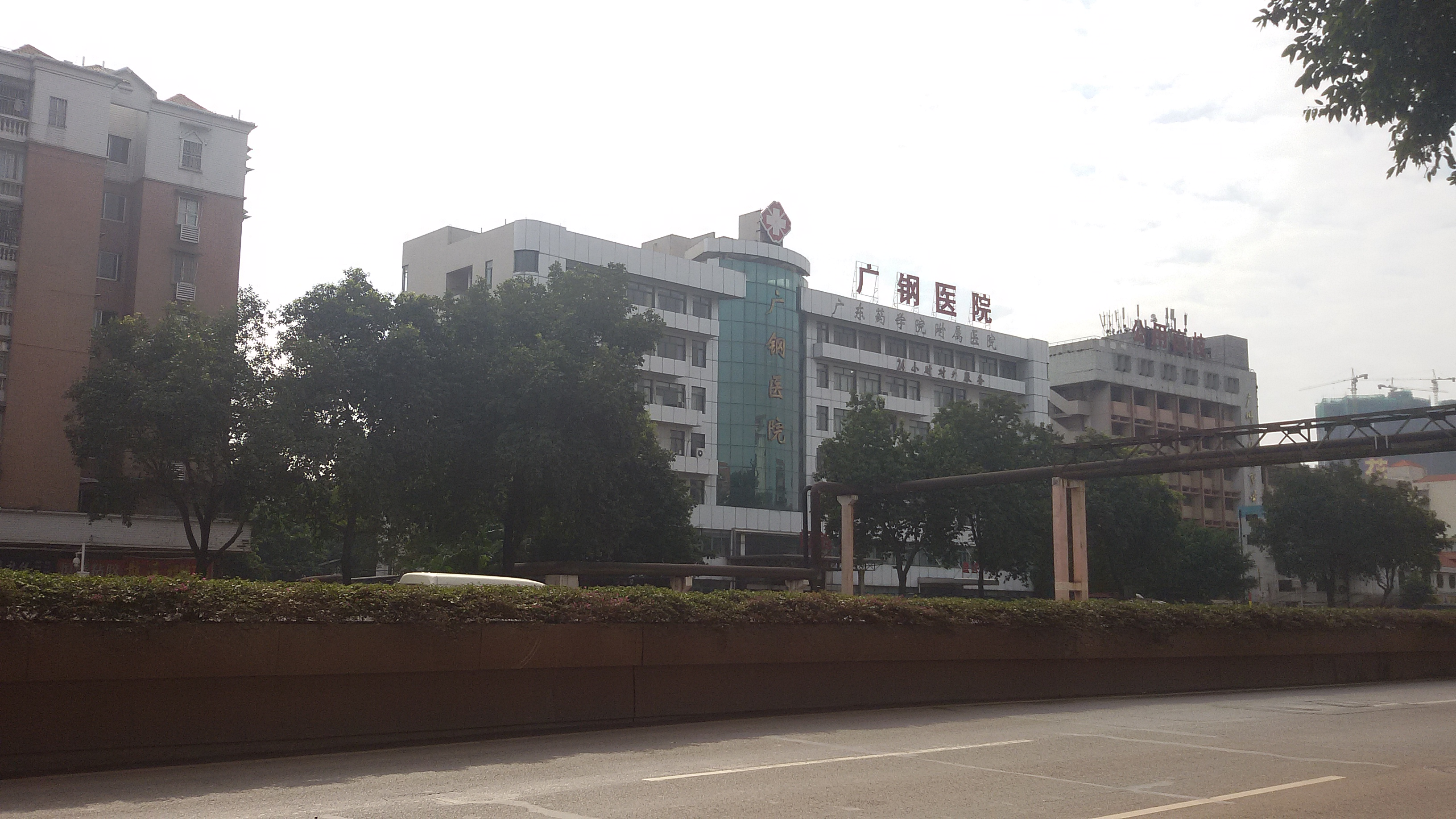 粵語: 廣東藥學院廣鋼附屬醫院